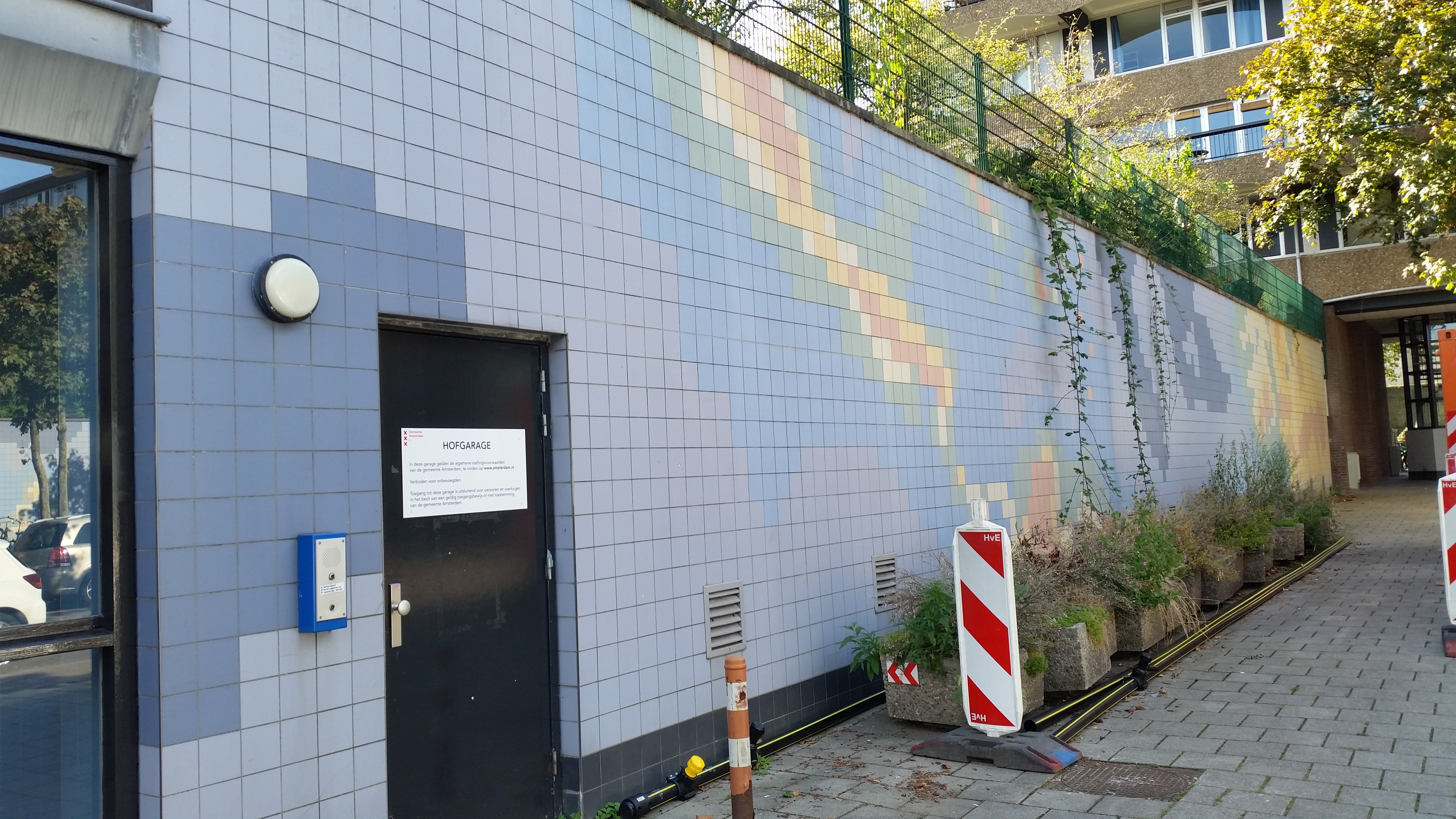 Kattenburgerkruisstraat, Amsterdam, zuidwest